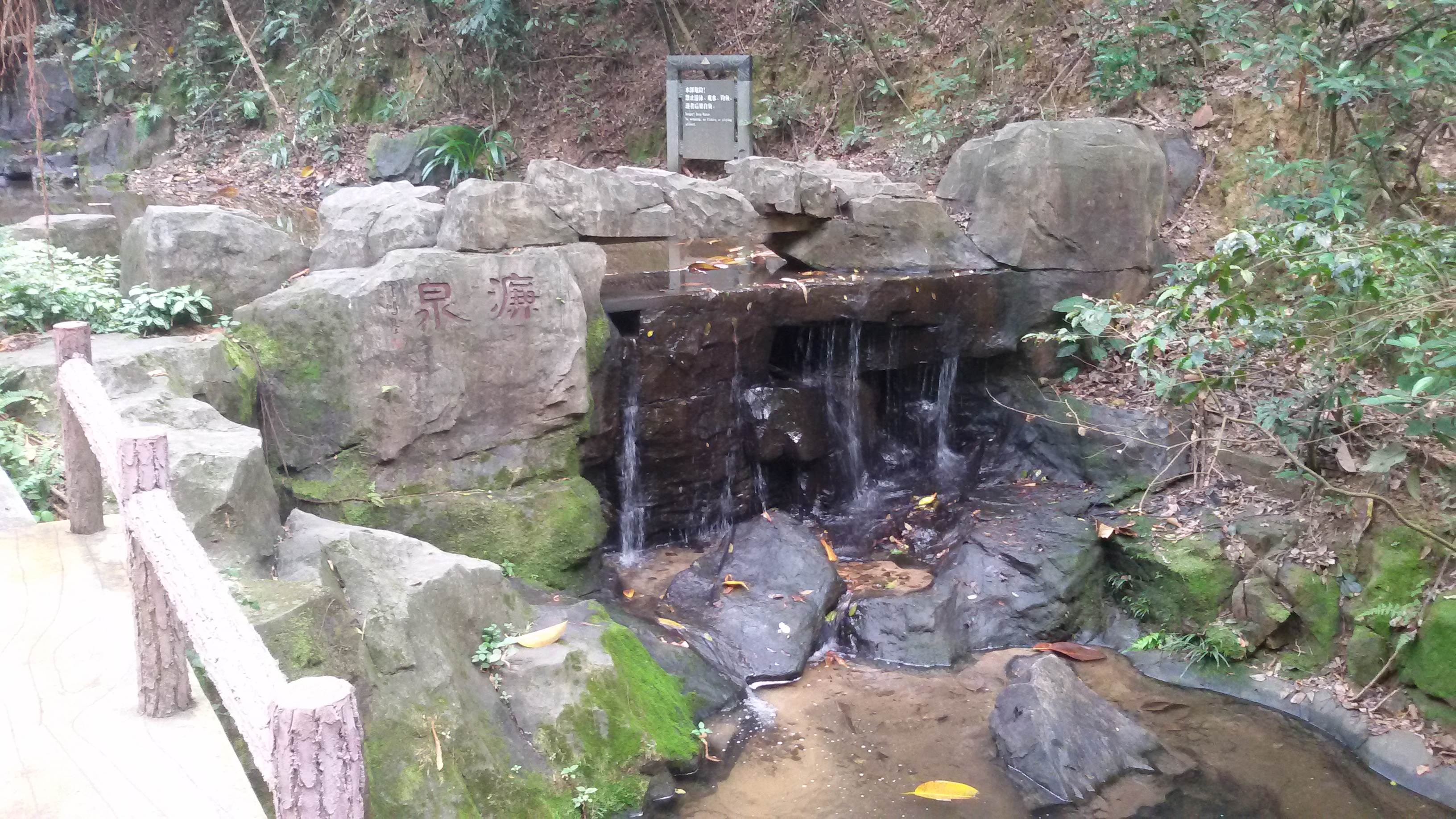 粵語: 蒲谷嘅濂泉景區